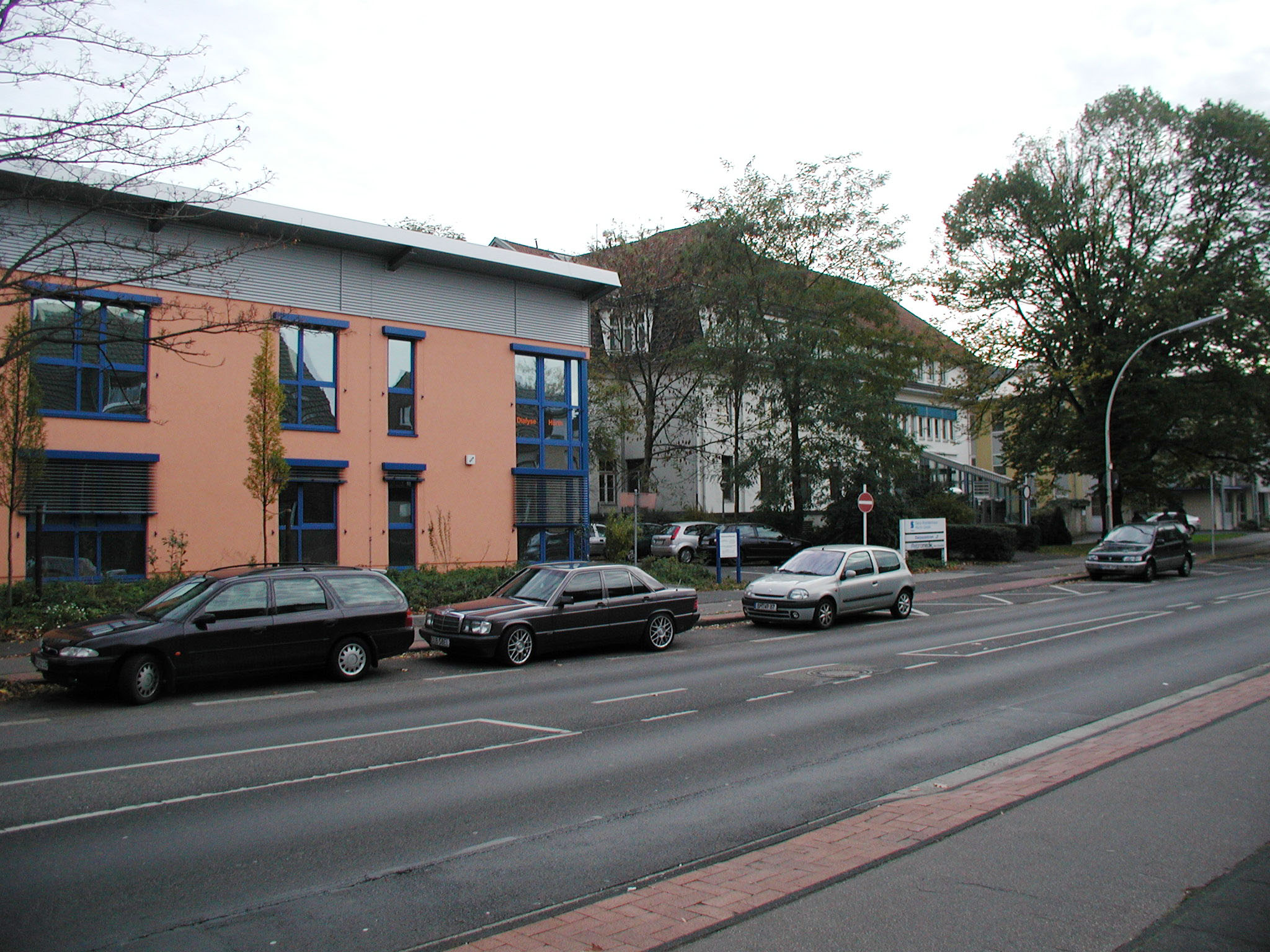 Huerth-Hermuelheim, SANA Krankenhaus